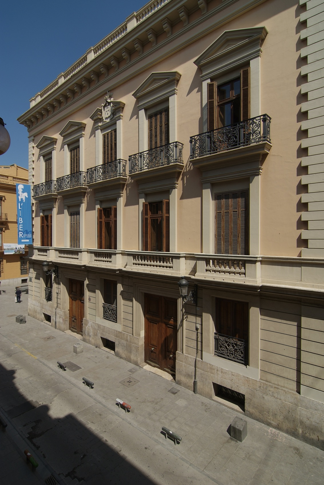 Fachada principal del Museo recayente a la calle Caballeros.